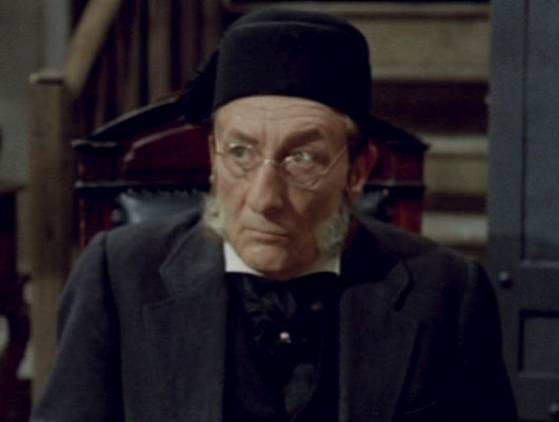 Renato Malavasi in a scene of the film Angeli senza paradiso